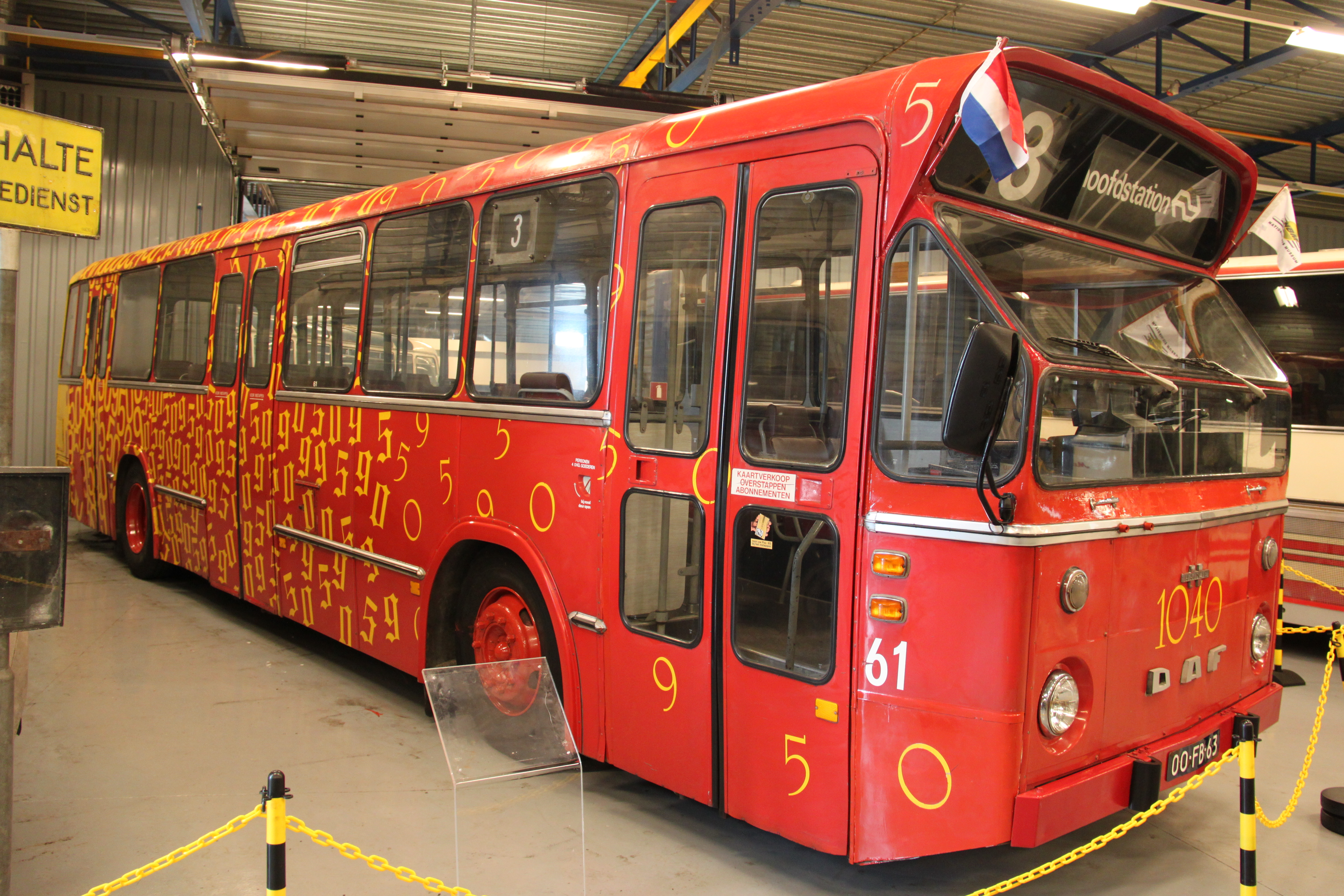 De GVBG 61 van het Nationaal Bus Museum